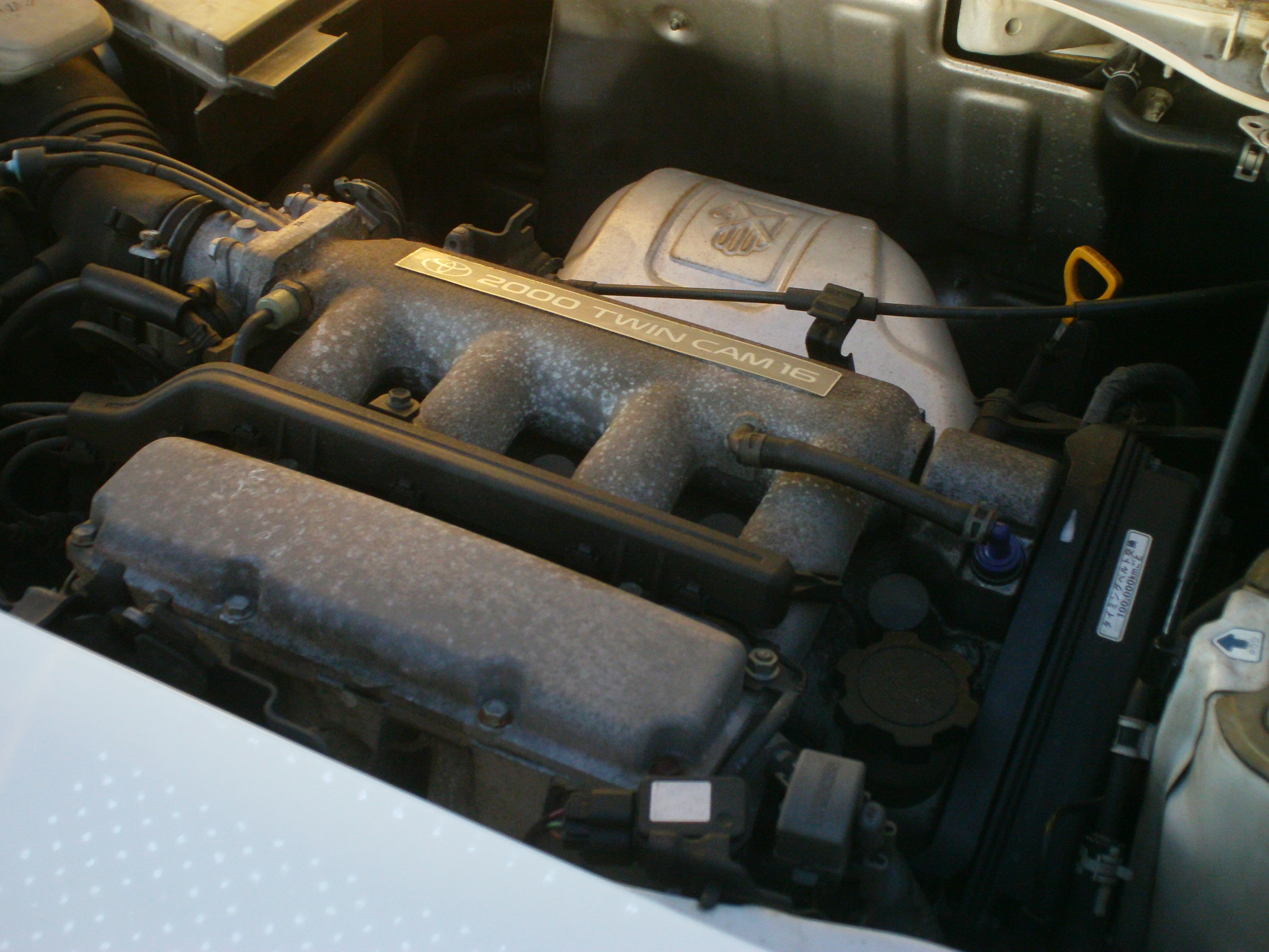 トヨタ・3S-GE型エンジン SW20型MR2、IV型